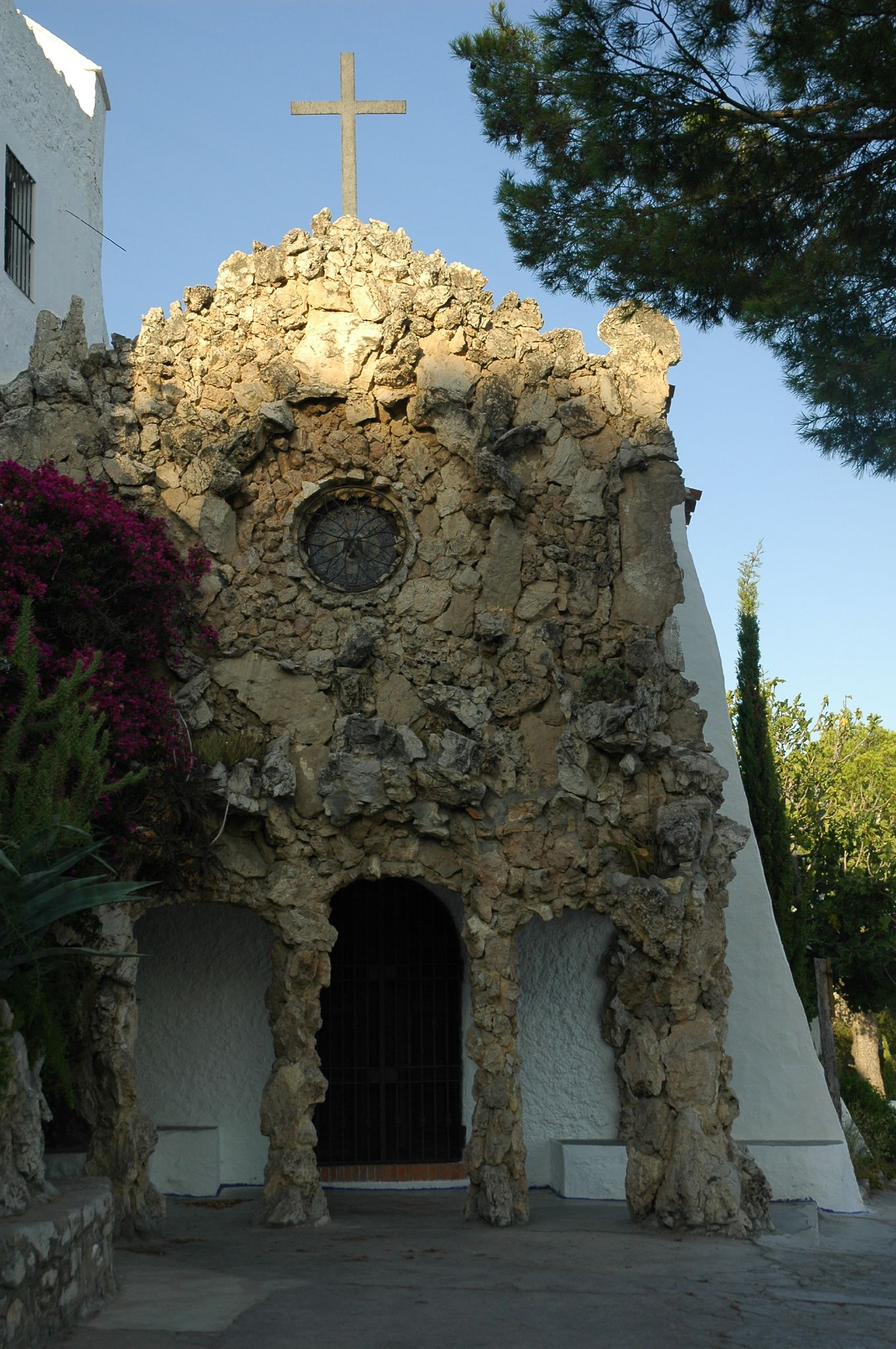 L'ermita de la Trinitat, en el Parc Natural del Garraf i en el terme municipal de Sitges